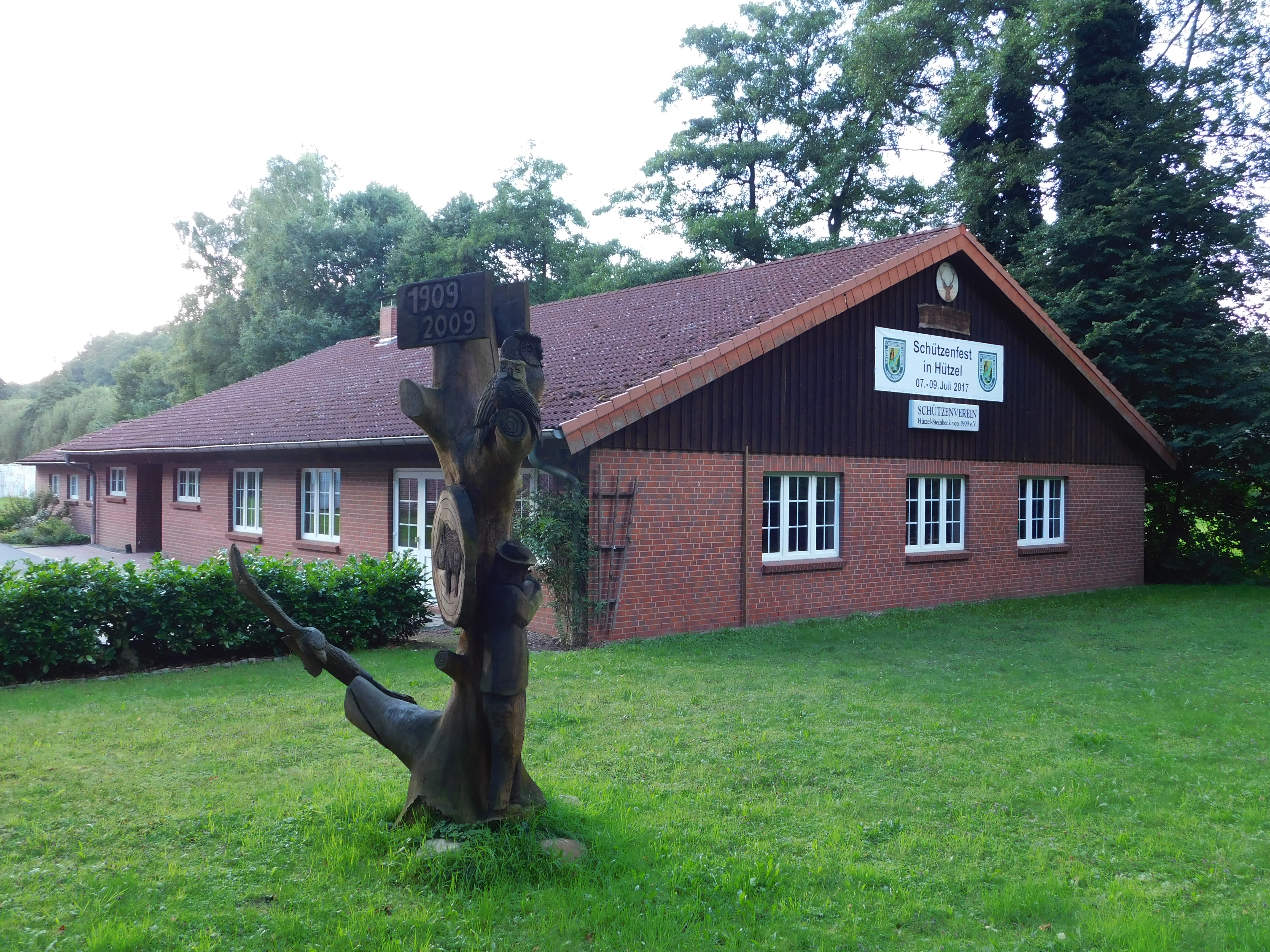 Schützenhaus des über hundert Jahre alten Schützenvereins Hützel-Steinbeck in Hützel.